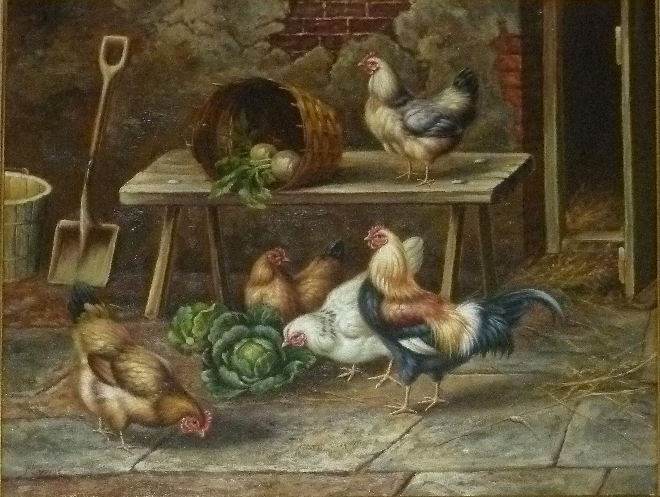 "Kippenfamilie", olieverf op doek (50 x 61 cm) door de Belgische kunstschilderes Jenny Hoppe (1870-1934); privébezit